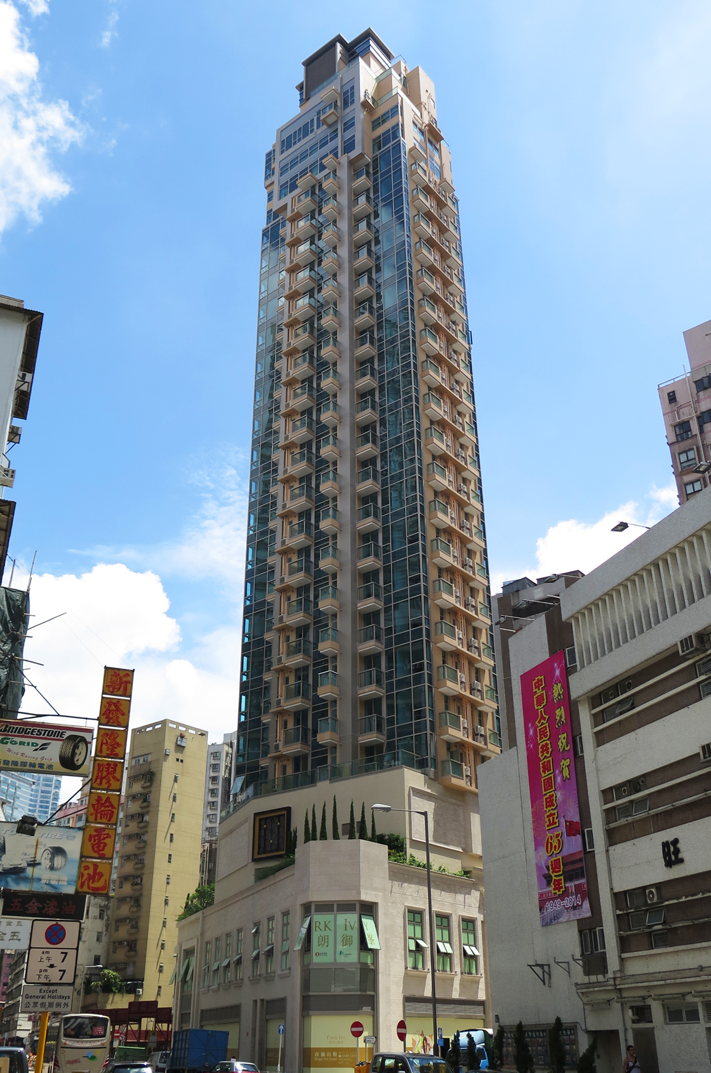 Park Ivy